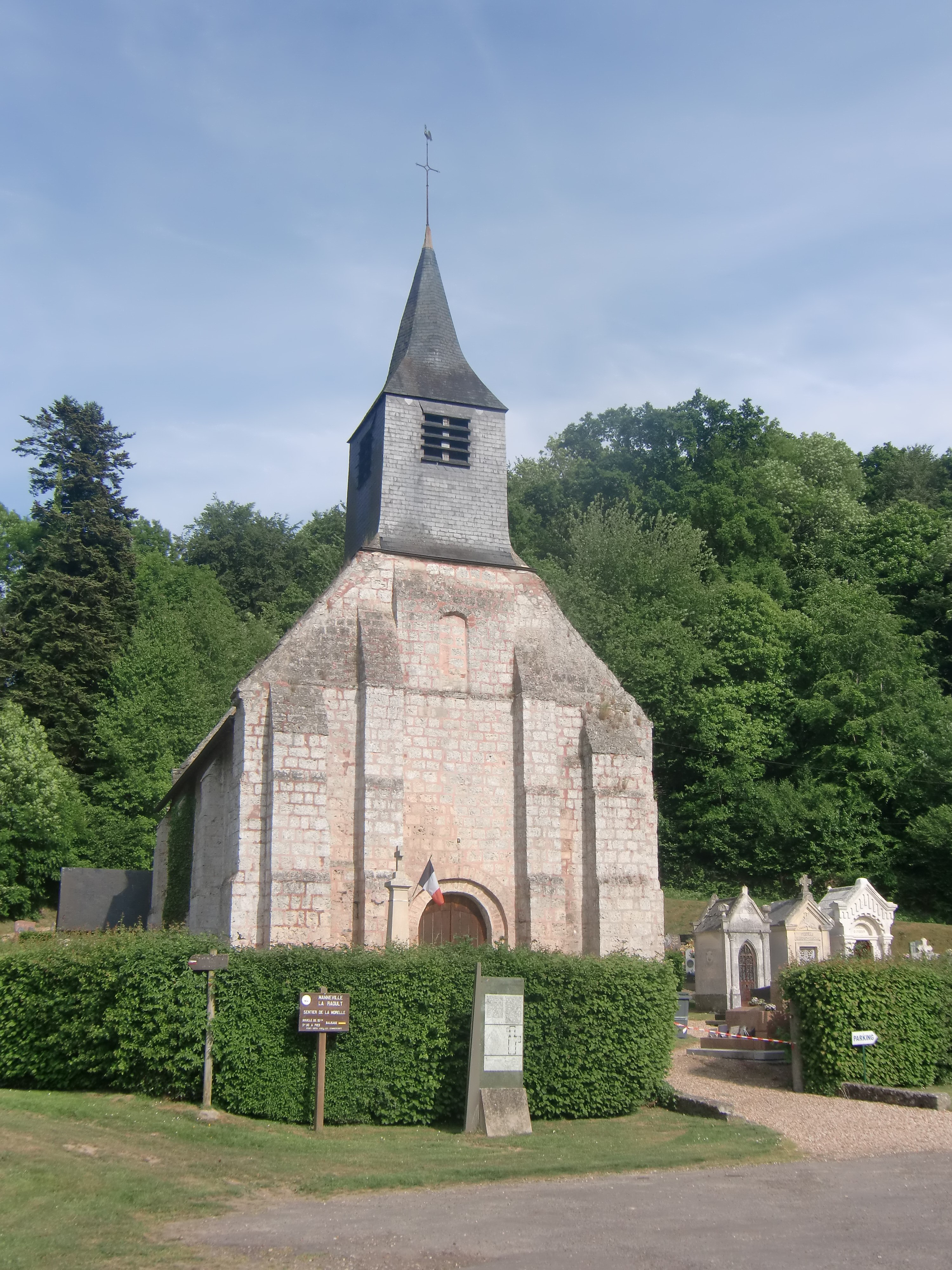 église paroissiale de Manneville-la-Raoult (Eure, Normandie, France)